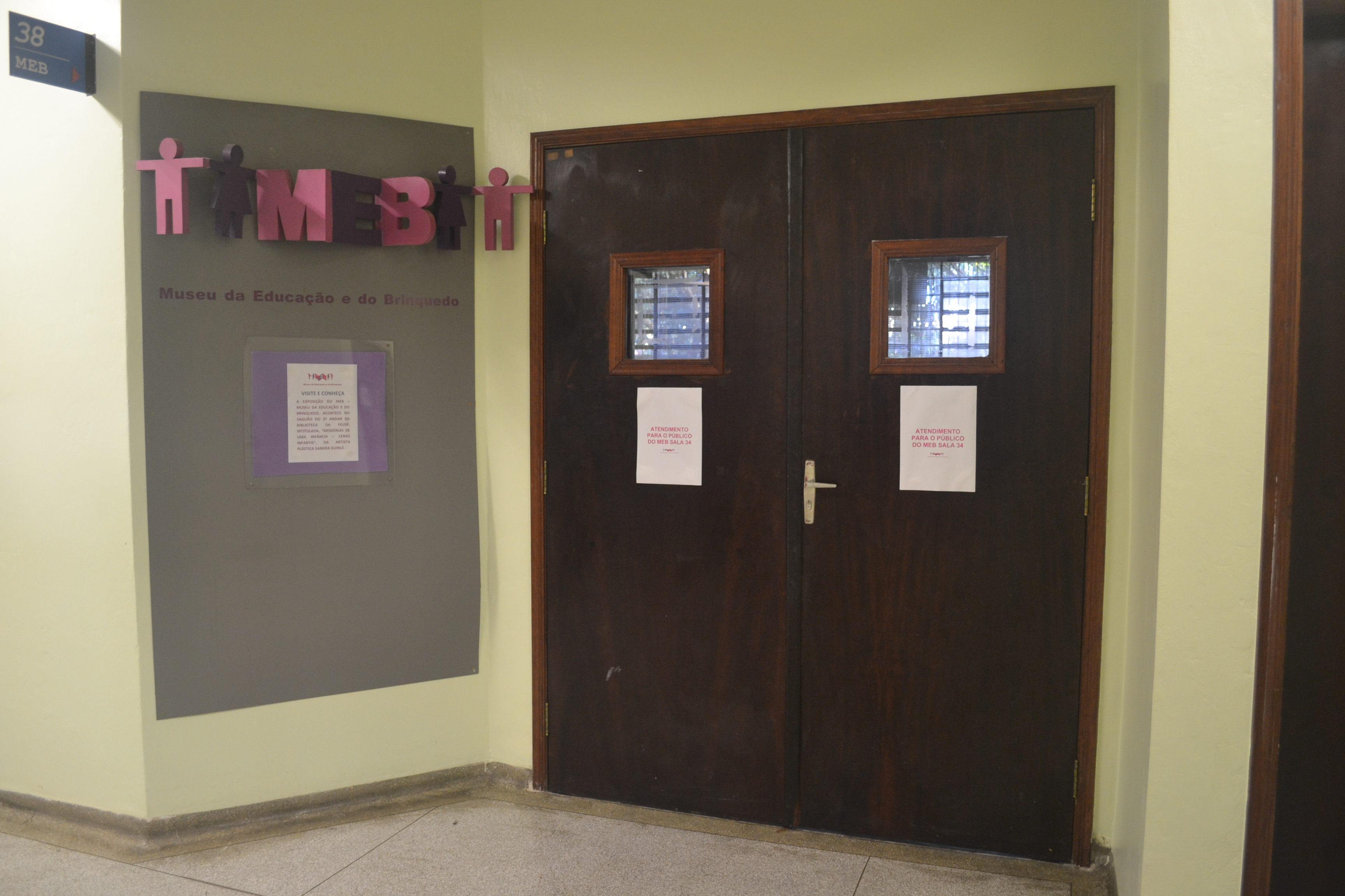 Logo e entrada do Museu da Educação e do Brinquedo no prédio da Faculdade de Educação da USP.